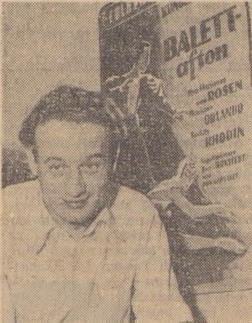 Josef Halfen.